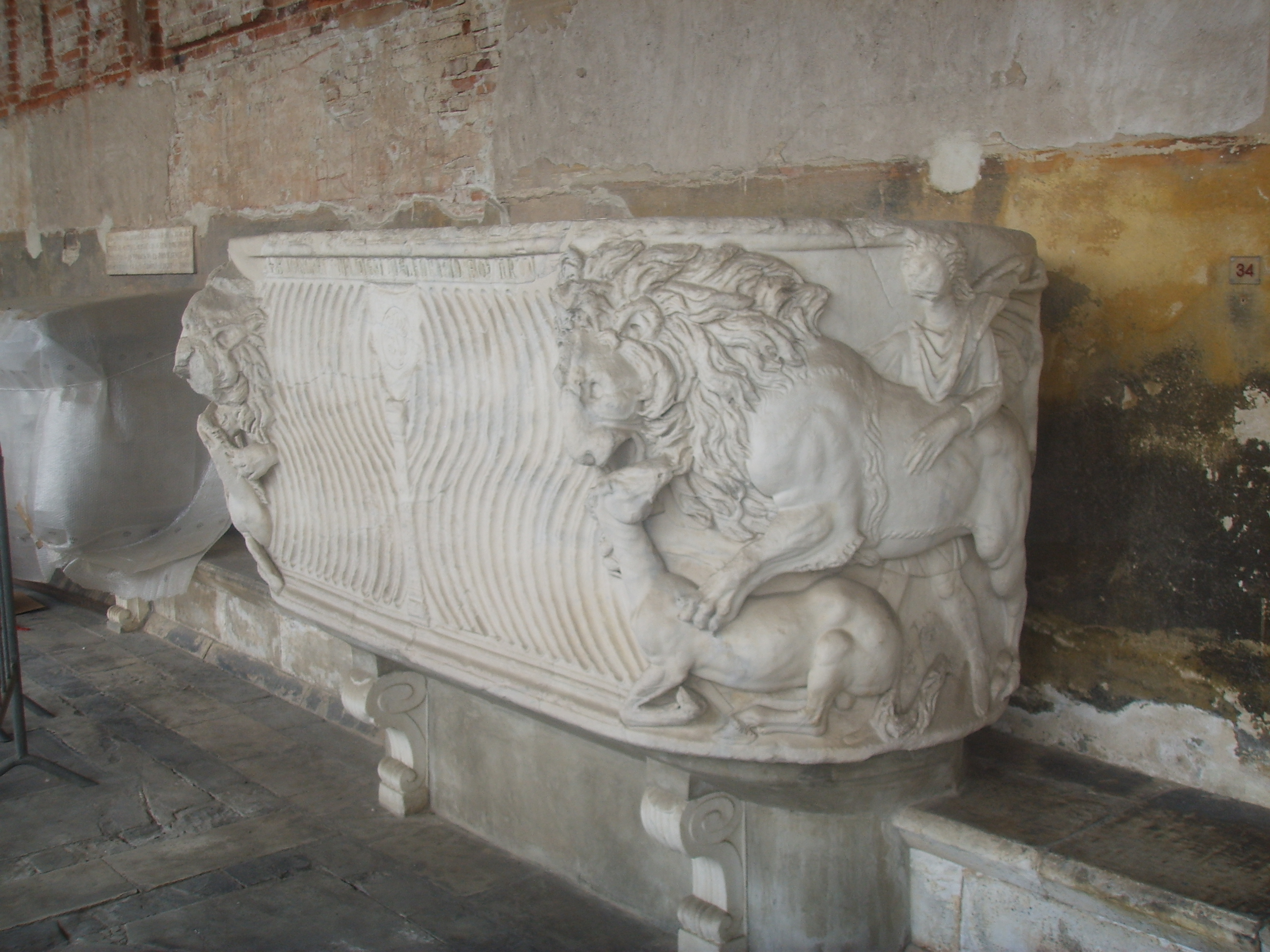 Camposanto Monumentale (monumental graveyard) Roman age sarcophagus. In Pisa, Italy.